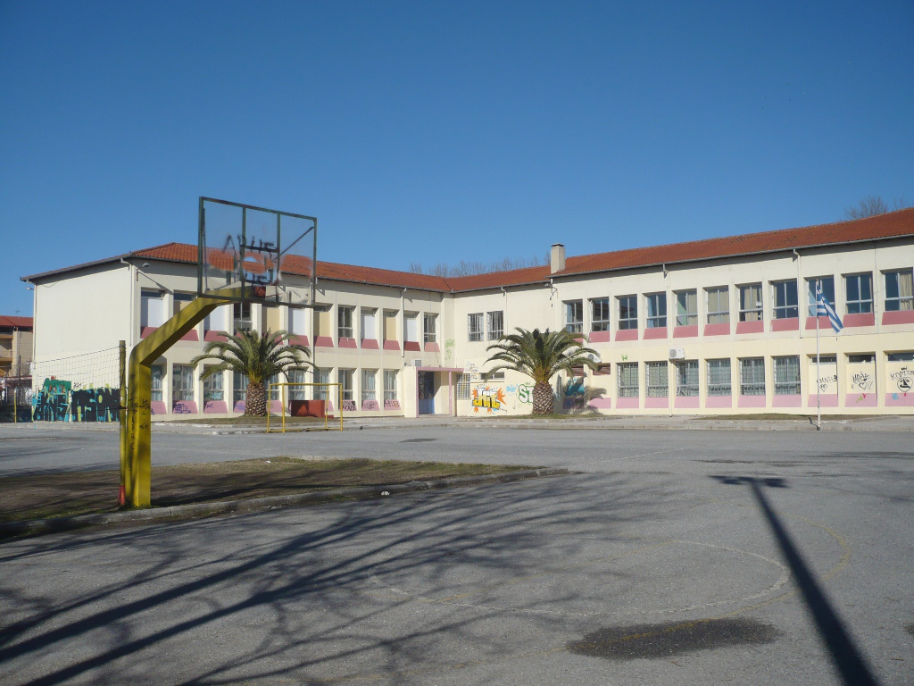 Ε.Λ Αγίου Αθανασίου